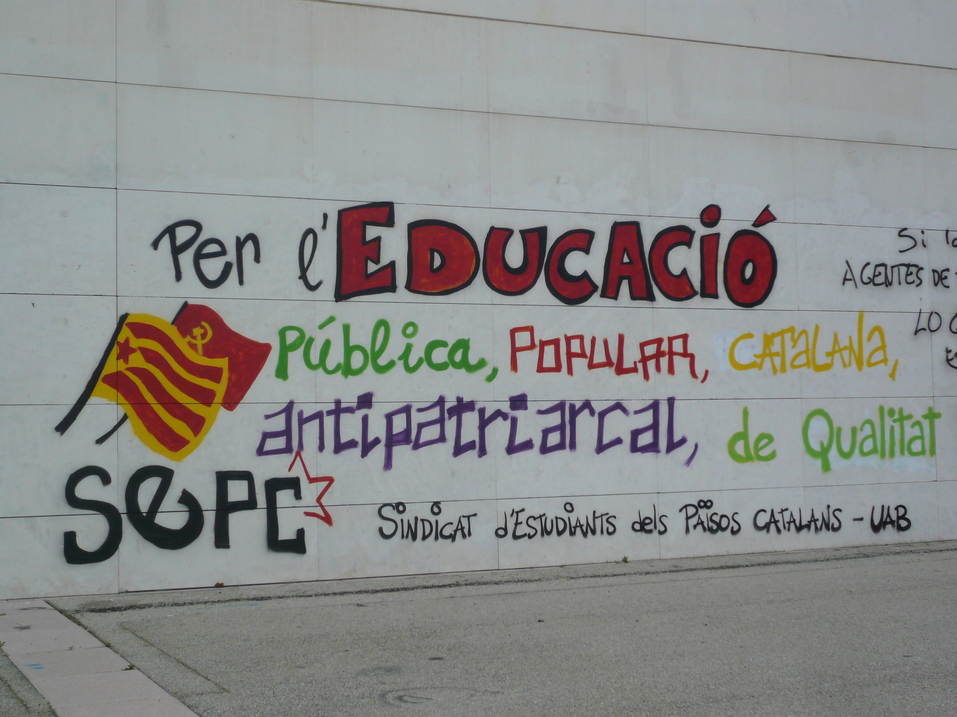 Mural dels eixos de lluita del Sindicat d'Estudiants dels Països Catalans, realitzat l'any 2012 entre la Plaça Cívica del campus de Bellaterra de la Universitat Autònoma de Barcelona i la seva Facultat de Ciències Polítiques i de Sociologia.